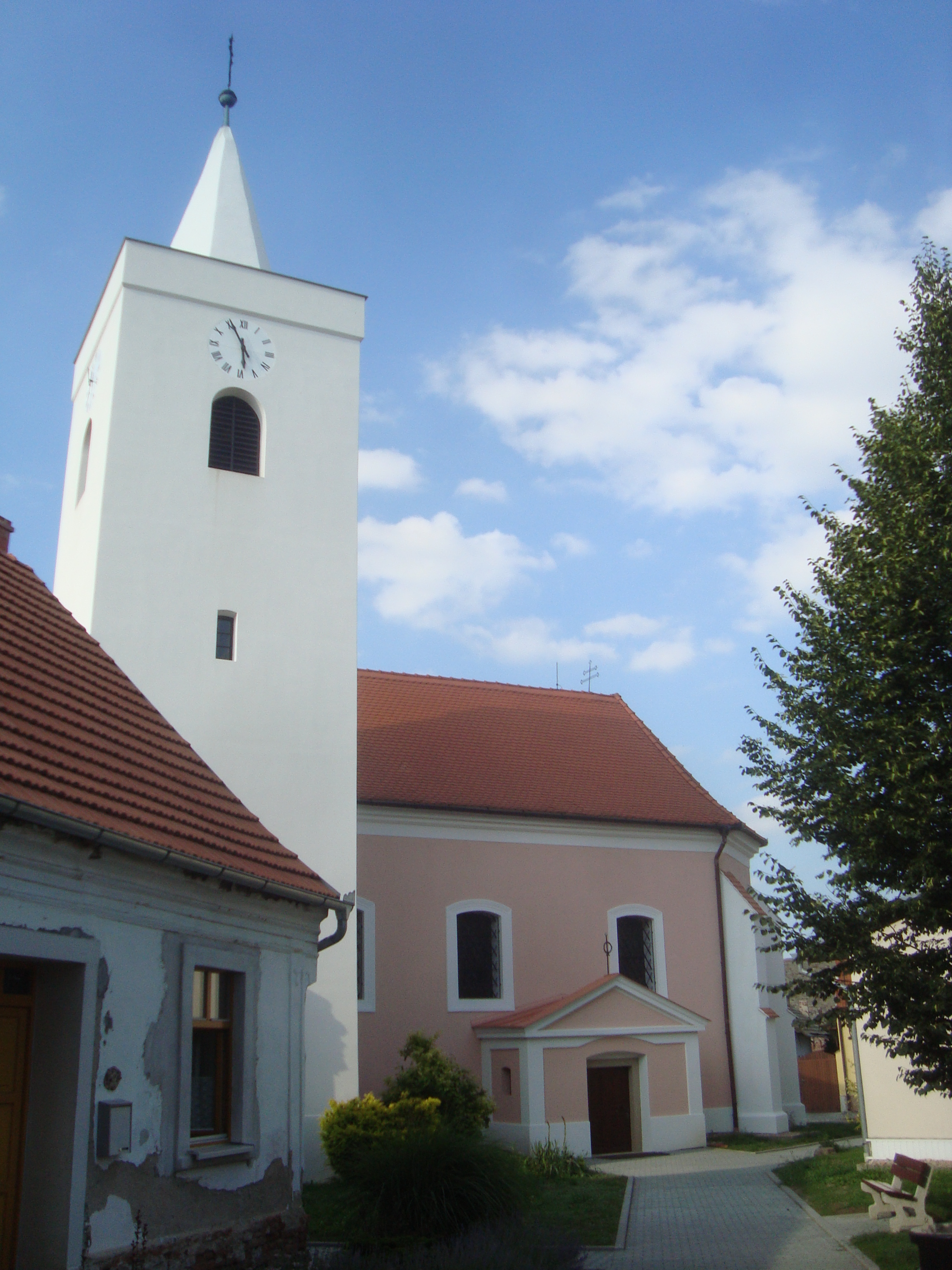 Malešovice kostel svatého Štěpána